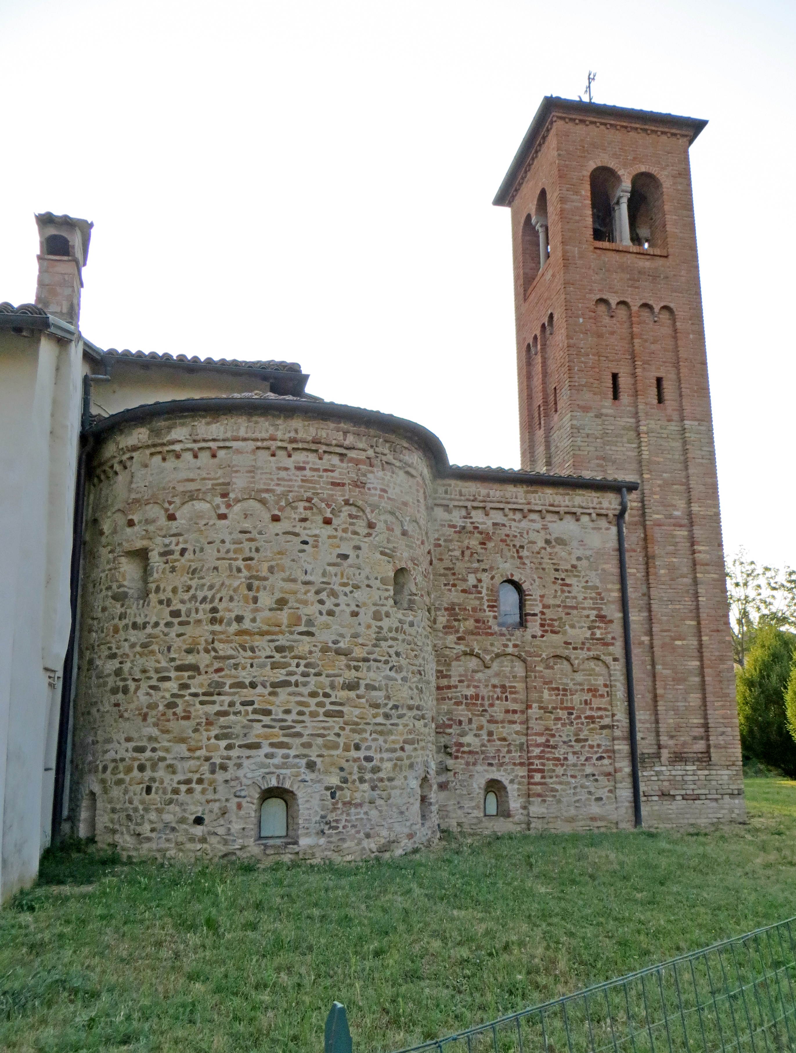 Chiesa dei Santi Simone e Giuda (Sanguinaro) - abside e campanile